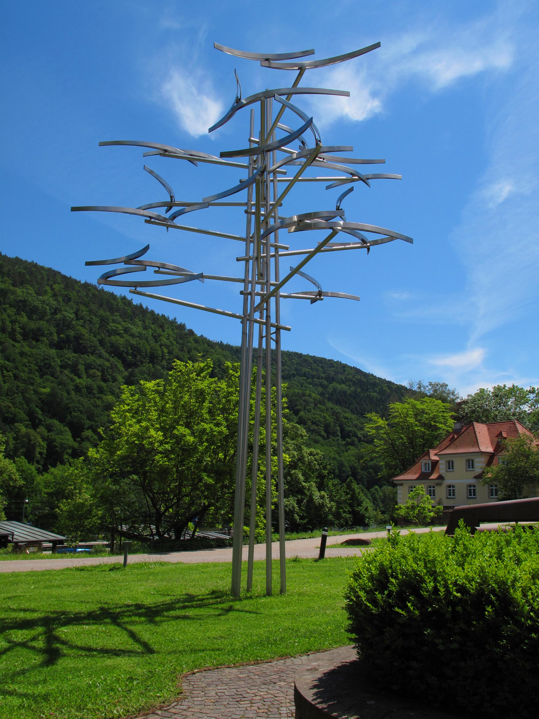 Hans-Michael Kissel, Life is movement, 1996 - Deutschland, Baden-Württemberg, Skulpturenpark Heidelberg